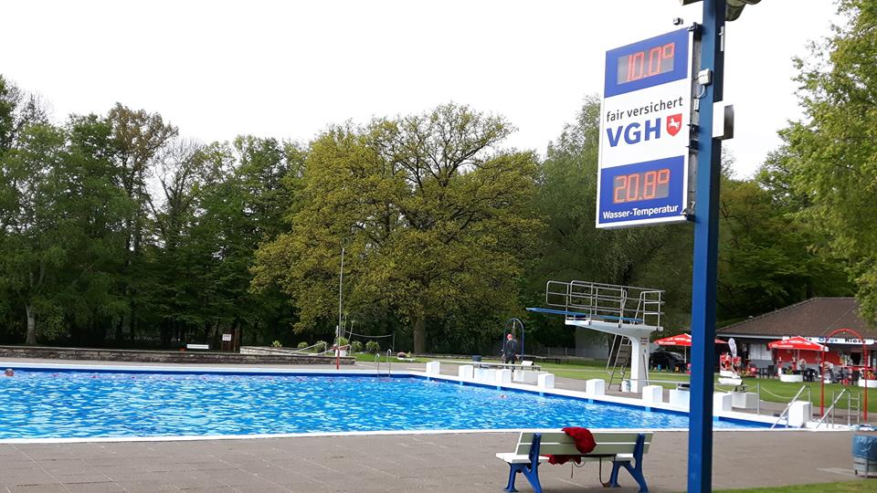 Das große Schwimmerbecken des Annabads mit Temperaturanzeigen, Sprunganlage, Gastronomie, Baumbestand